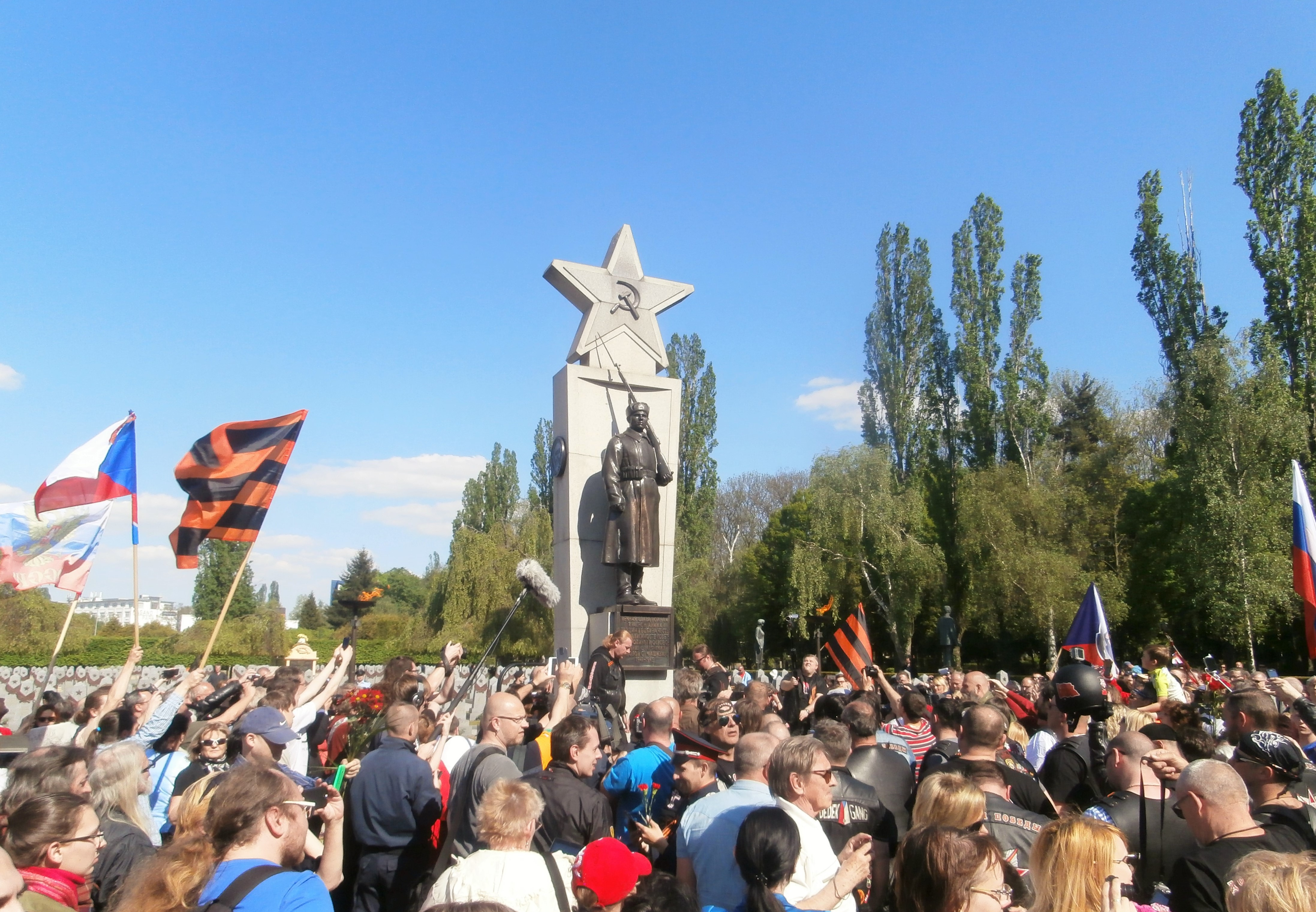 Příznivci ruského nacionalistického motorkářského klubu Noční vlci na pražských Olšanských hřbitovech, 7. 5. 2016